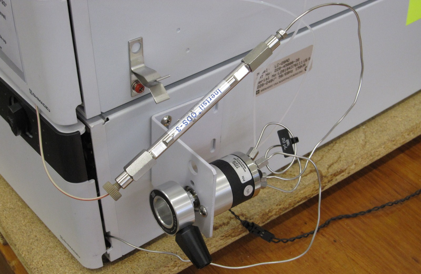 De kolom van een HPLC systeem in de labzaal universiteit Leiden